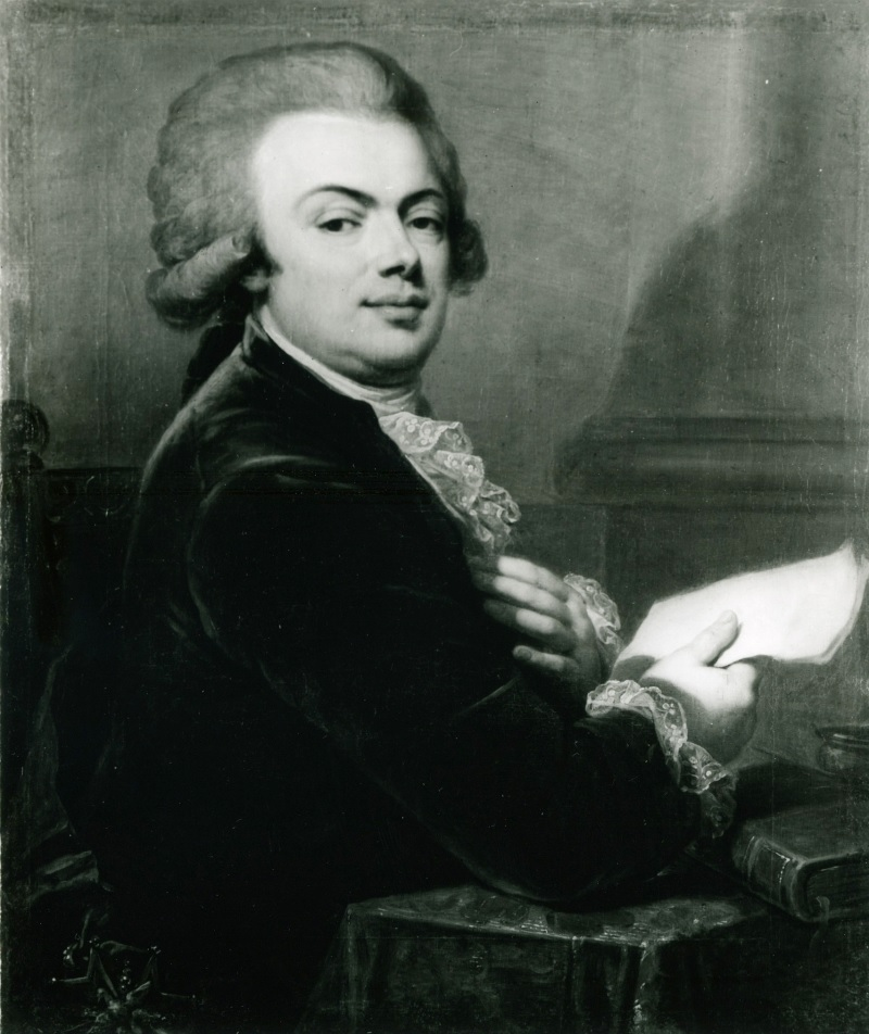 Belarusian (Taraškievica orthography): Партрэт Людвіка Тышкевіча (Ludvik Tyškievič)title QS:P1476,be-tarask:"Партрэт Людвіка Тышкевіча (Ludvik Tyškievič)" label QS:Lbe-tarask,"Партрэт Людвіка Тышкевіча (Ludvik Tyškievič)"